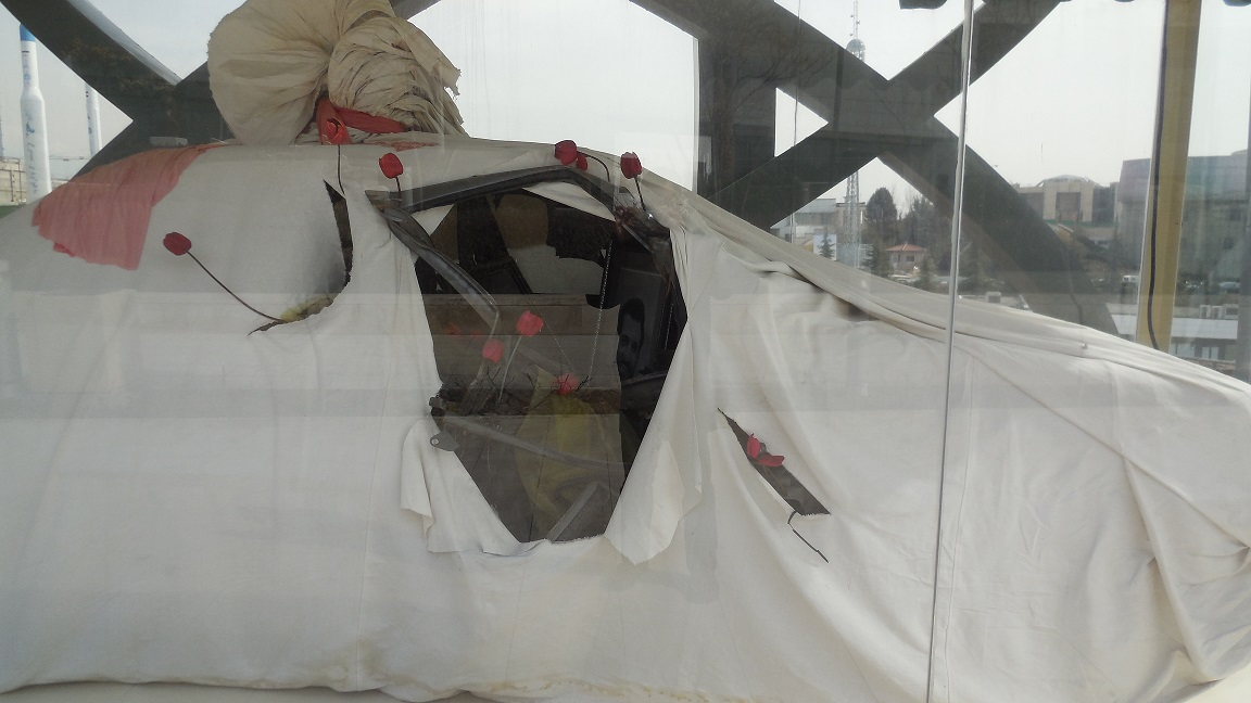 خودروی بمب گذاری شده شهید احمدی روشن واقع در باغ موزه دفاع مقدس